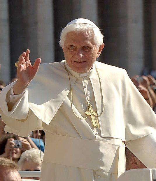 Le pape Benoît XVI salue la foule sur la place Saint-Pierre au Vatican.